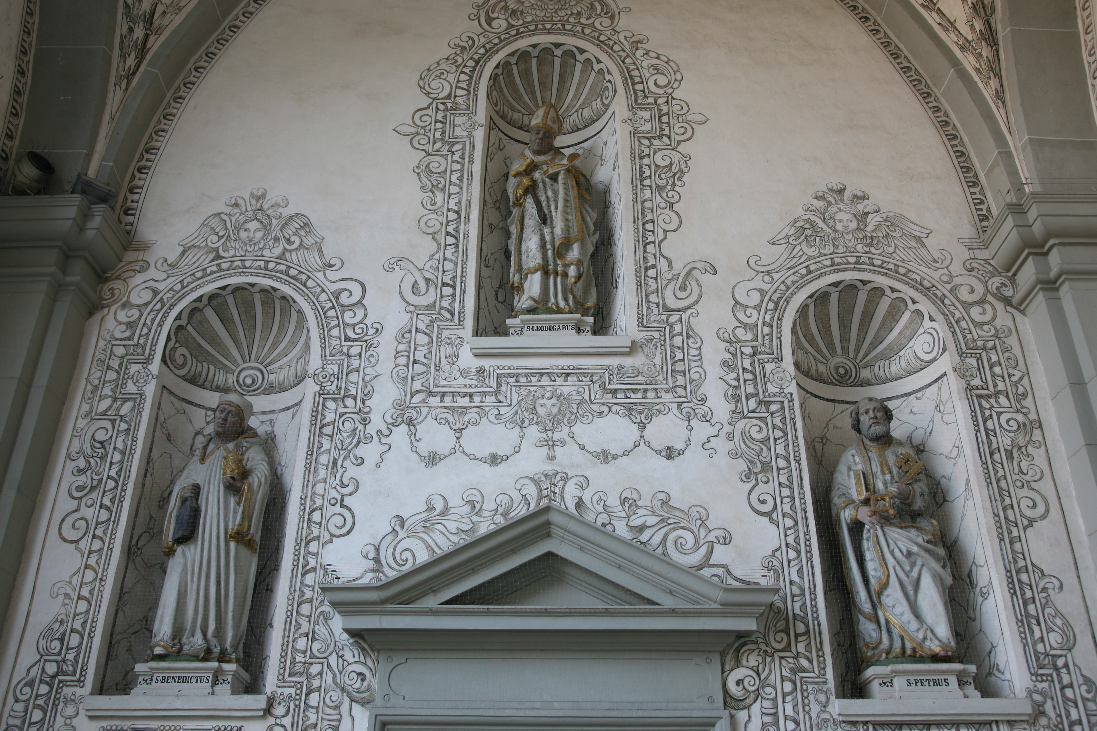 Vorzeichen Nordseite